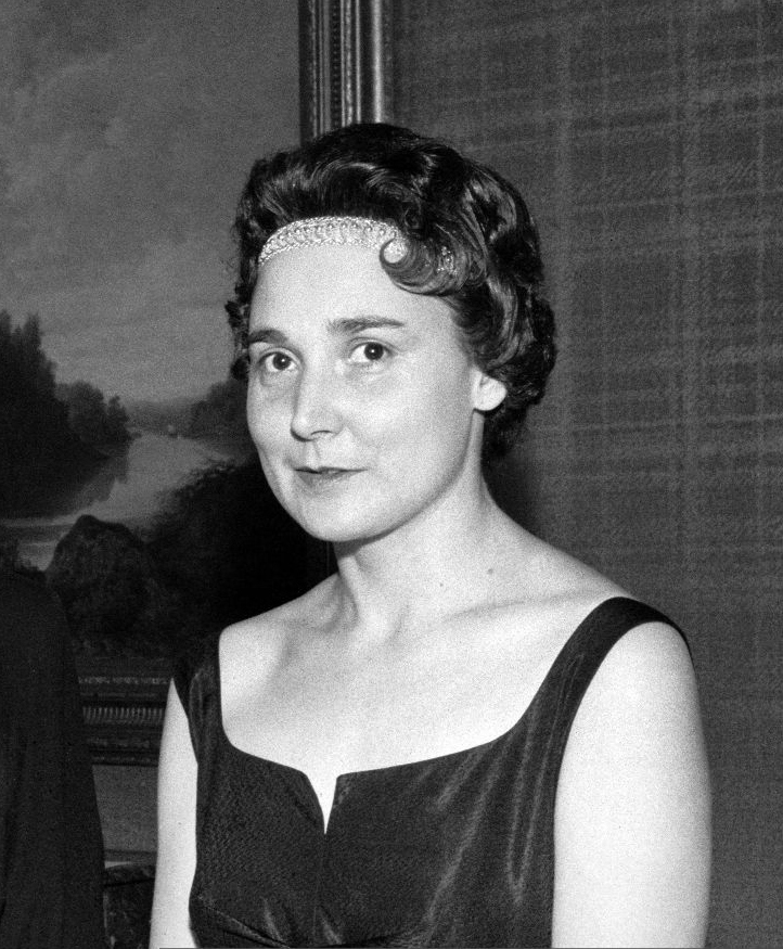 Brita Kekkonen (1927–2013) itsenäisyyspäivän vastaanotolla.